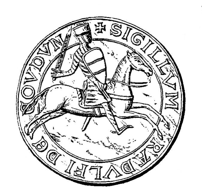 Sceau de Raoul de Coudun D'après De Gaignières dans Histoire de l'Abbaye N-D d'Ourscamp- A.Peigné-Delacourt - BnF